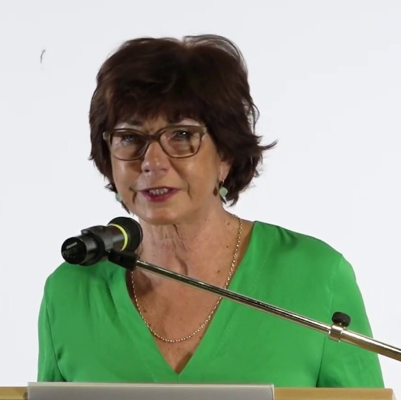 Zur Eröffnung der Konferenz «Regulation des Kapitalismus im Umbruch: Den Tiger reiten! Perspektiven kritischer politischer Ökonomie und alternativer Wirtschaftspolitik» sowie Verleihung des Jörg-Huffschmid-Preises.